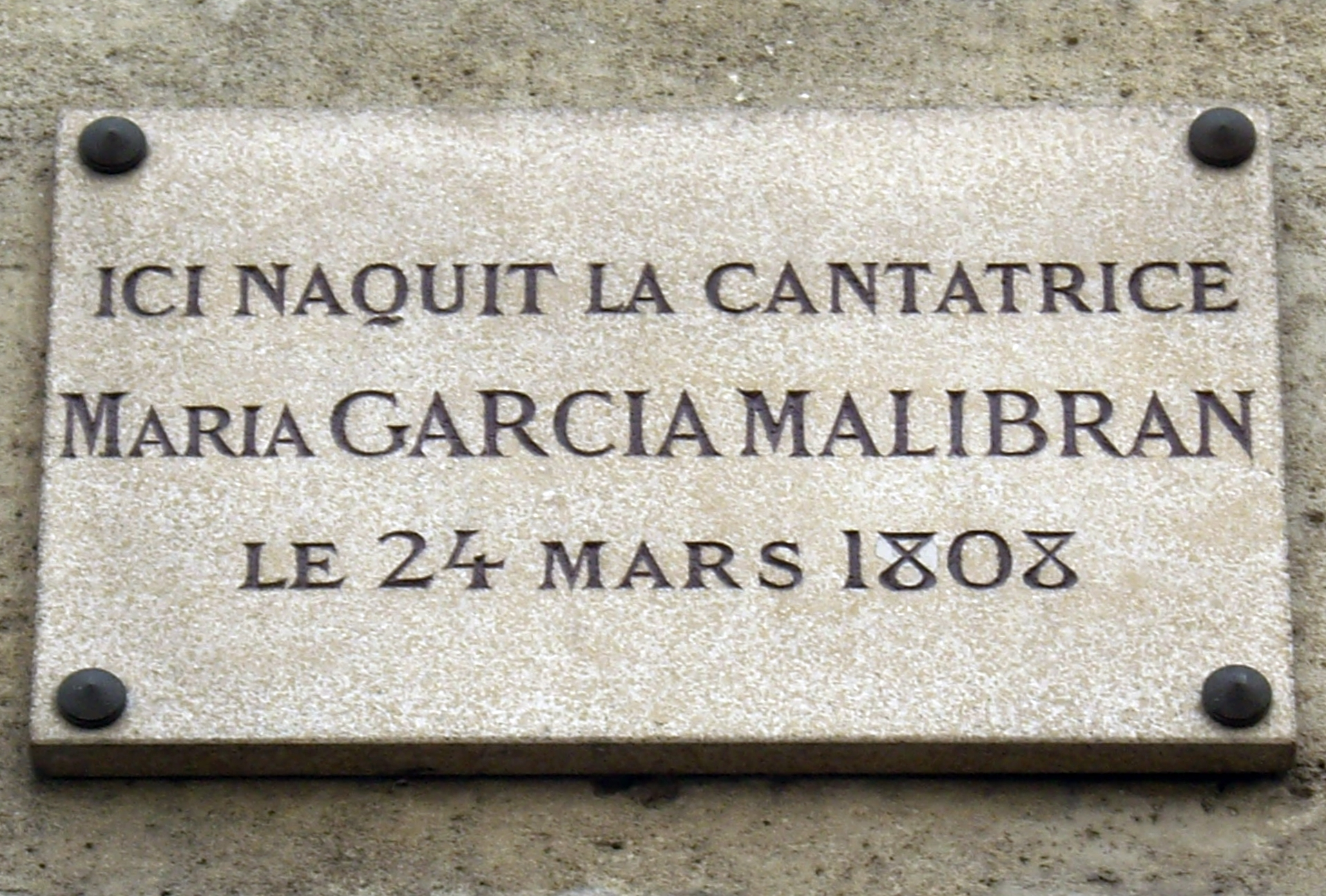 Plaque commémorative, 3 rue de Condé, Paris 6e. « Ici naquit la cantatrice Maria Garcia Malibran le 24 mars 1808. »